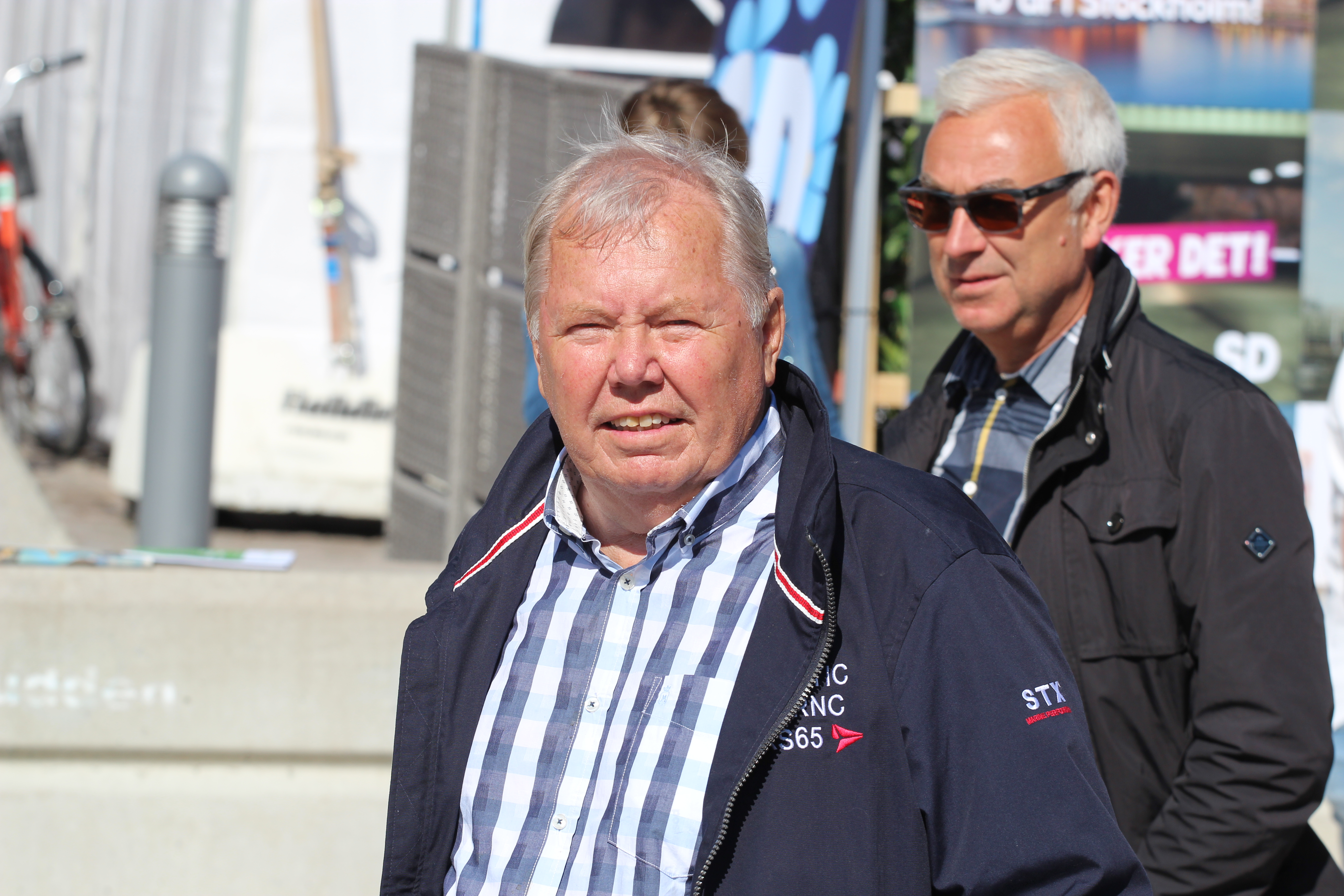 Bert Karlsson, Almedalen Week 2017.